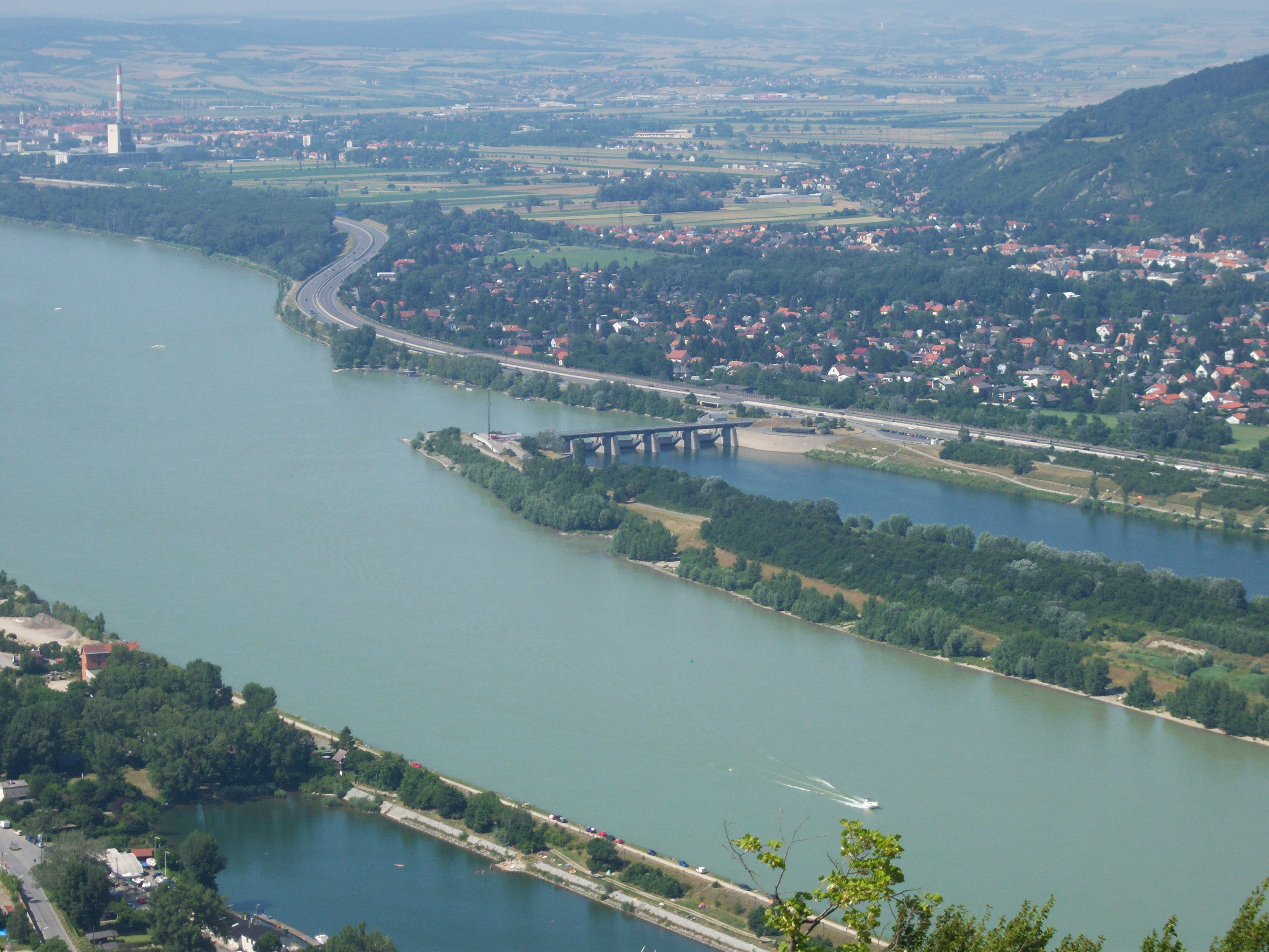 Blick vom Leopoldsberg auf den Anfang der Donauinsel und den Zusammenfluss von Donau und Neue Donau